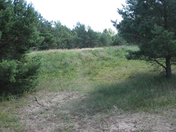 Paatsa linnus